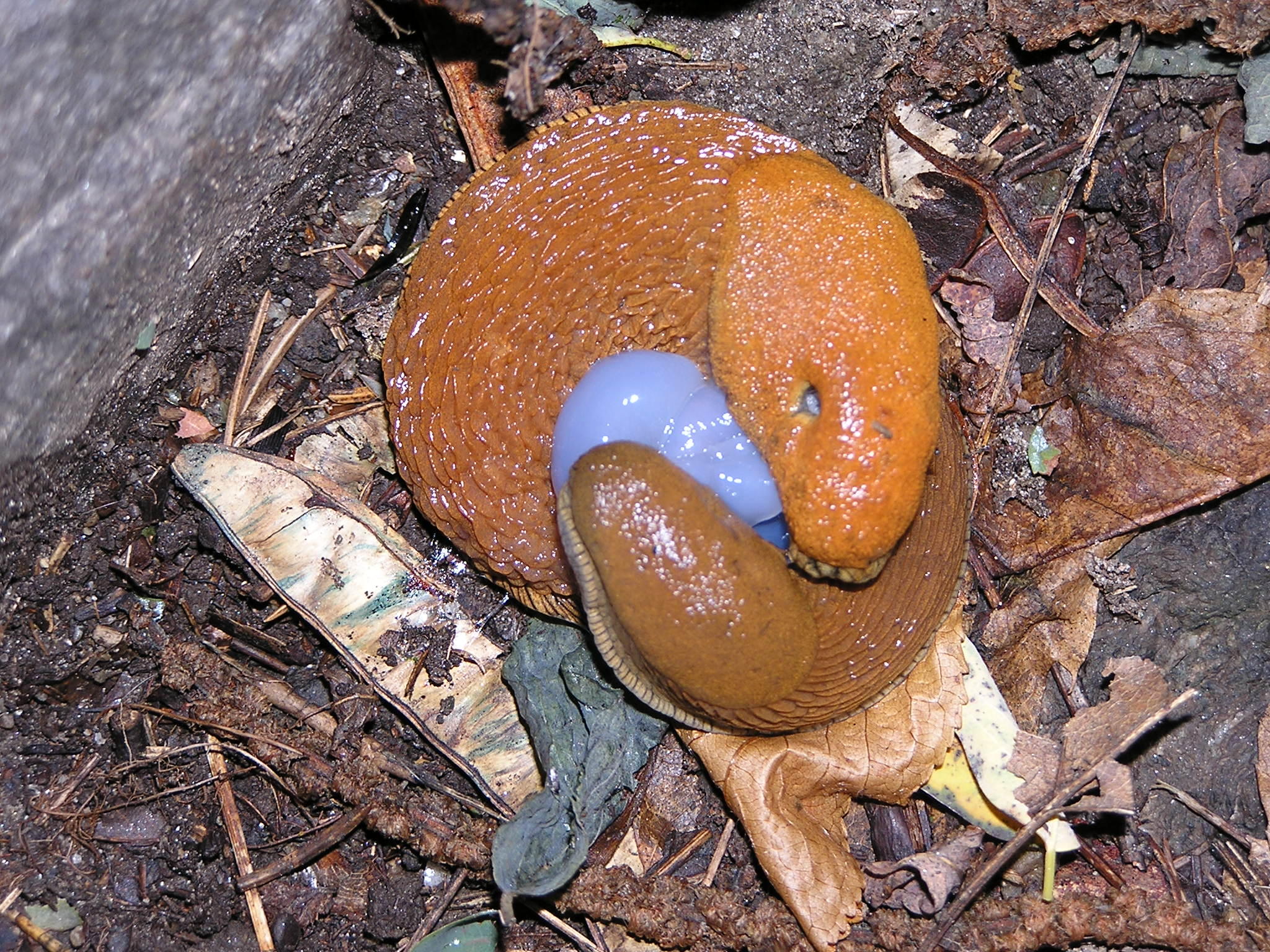 Kopula von Arion vulgaris (Mabille 1868)